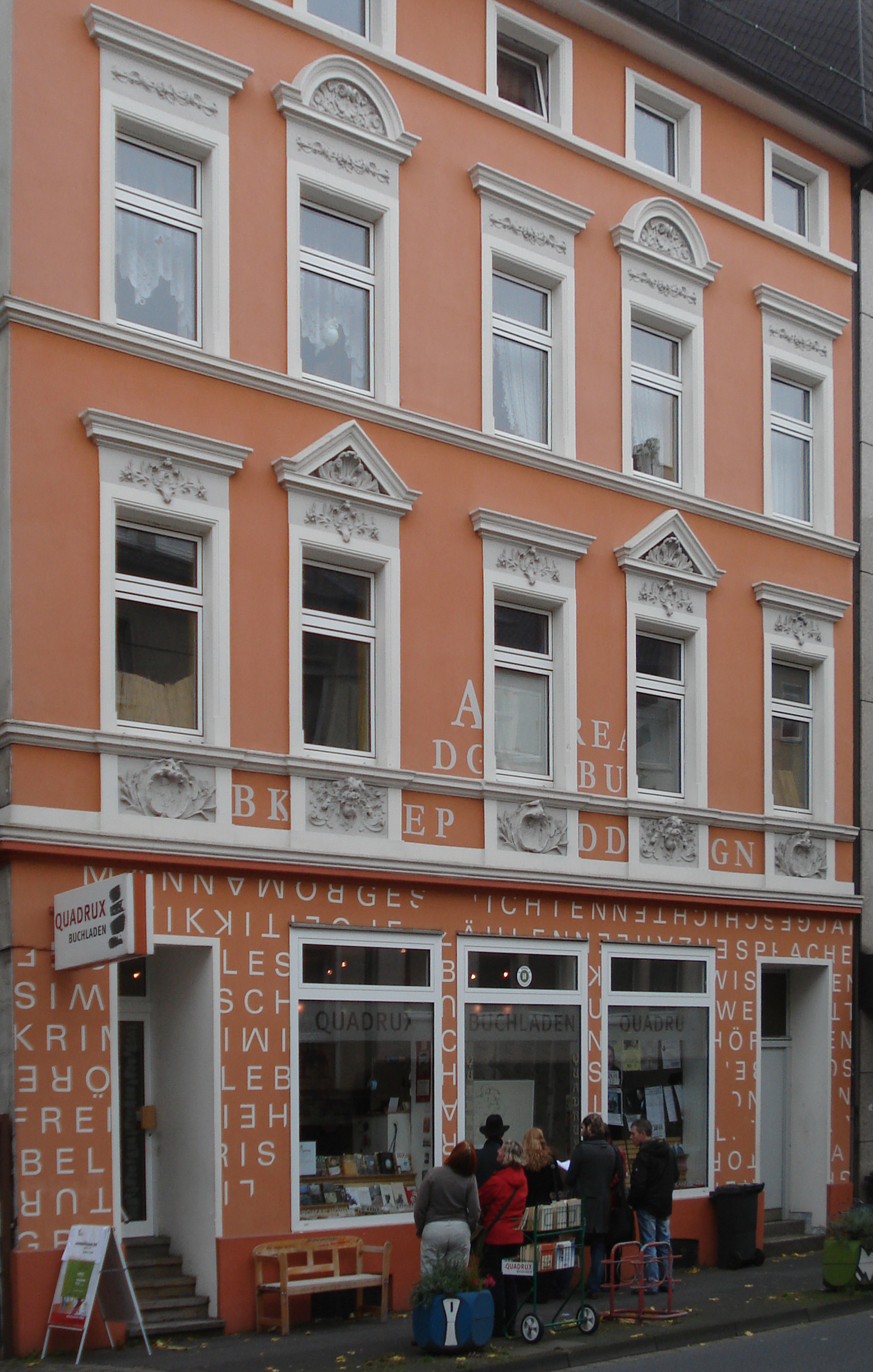 Buchladen Quadrux in Hagen-Wehringhausen, Lange Straße